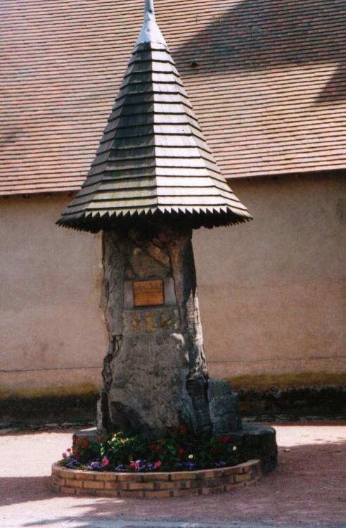 L'Arbre de Sully de Gannay sur loire